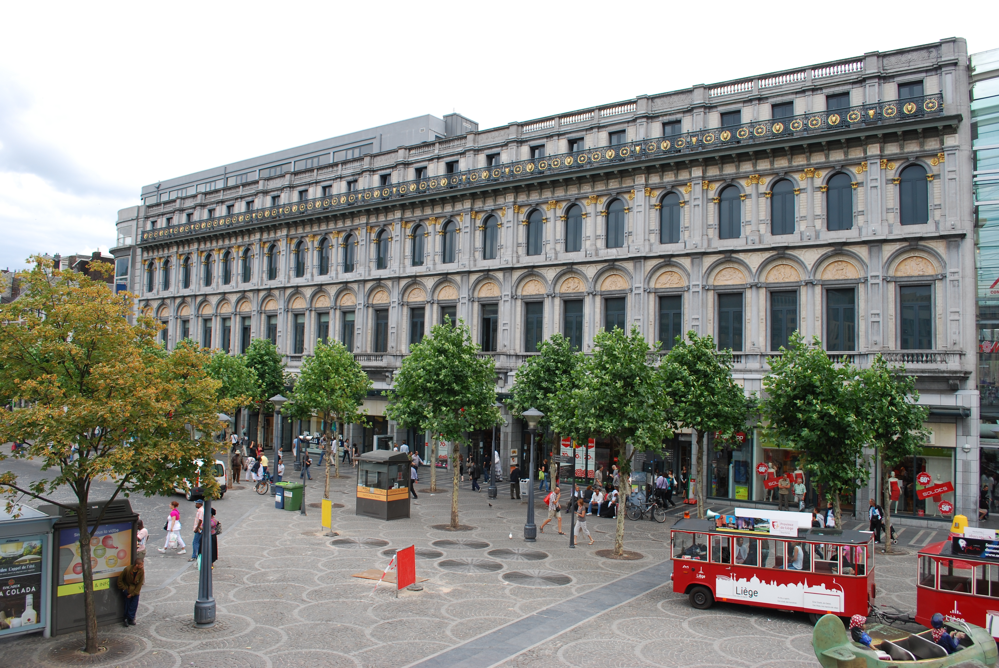 La place Saint-Lambert à Liège : façade de l'ancien "Grand Bazar".